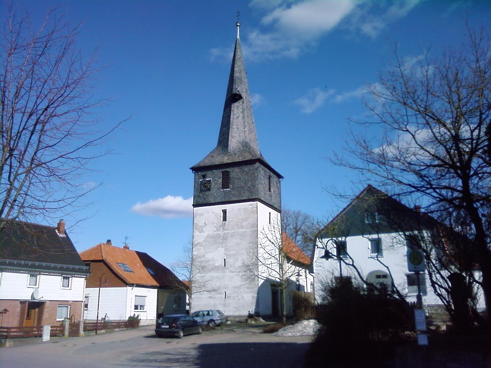 Despetal, Ortsteil Eitzum